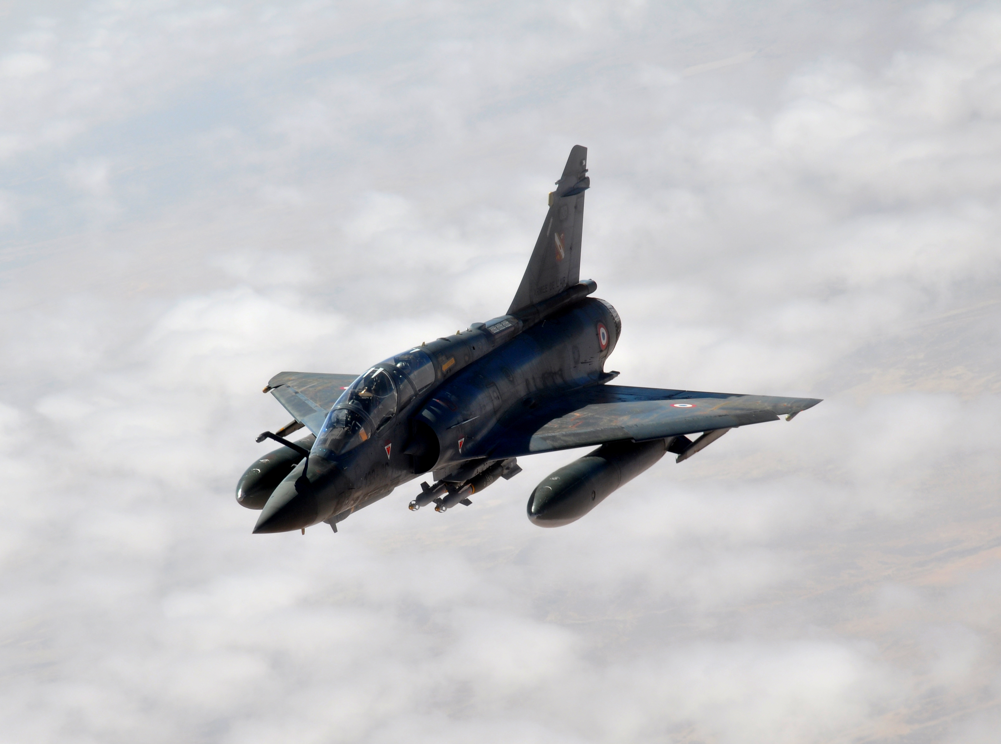 Mirage 2000D 133-JC de l'escadron de chasse 2/3 Champagne basé à la base aérienne 133 Nancy-Ochey au dessus de l'Afrique le 29 janvier 2013 durant l'opération Serval. Photo pris un KC-135 Stratotanker du 100th Air Refueling Wing de l'U.S. Air Force basé à RAF Mildenhall.